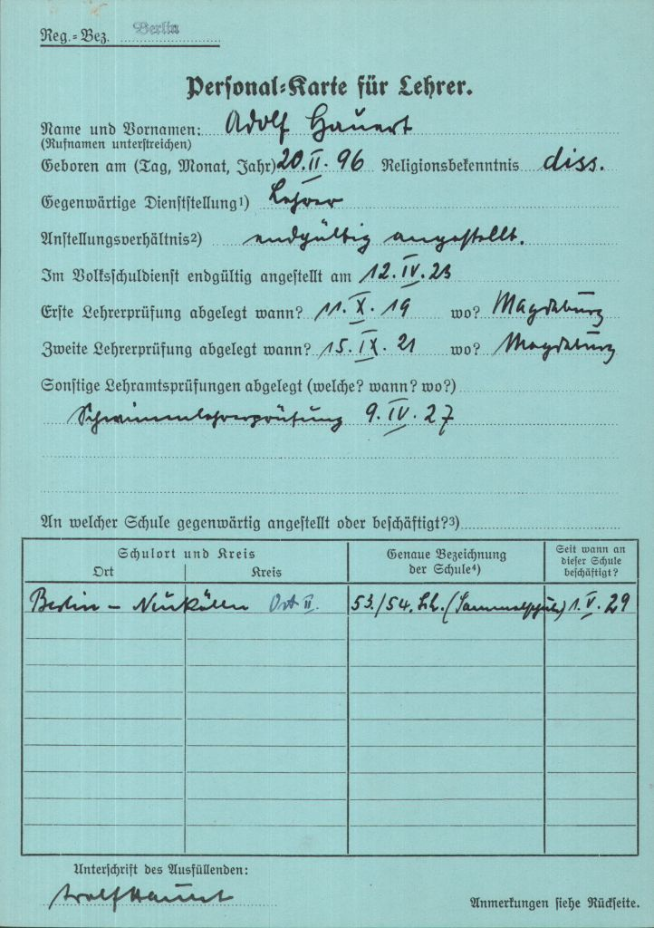 Personalkarte für den Lehrer Adolf Hauert